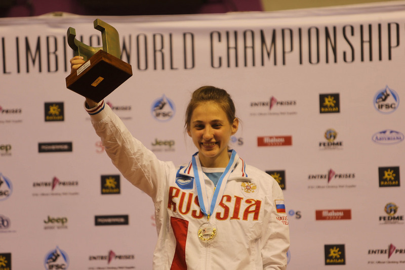 Алина Гайдамакина